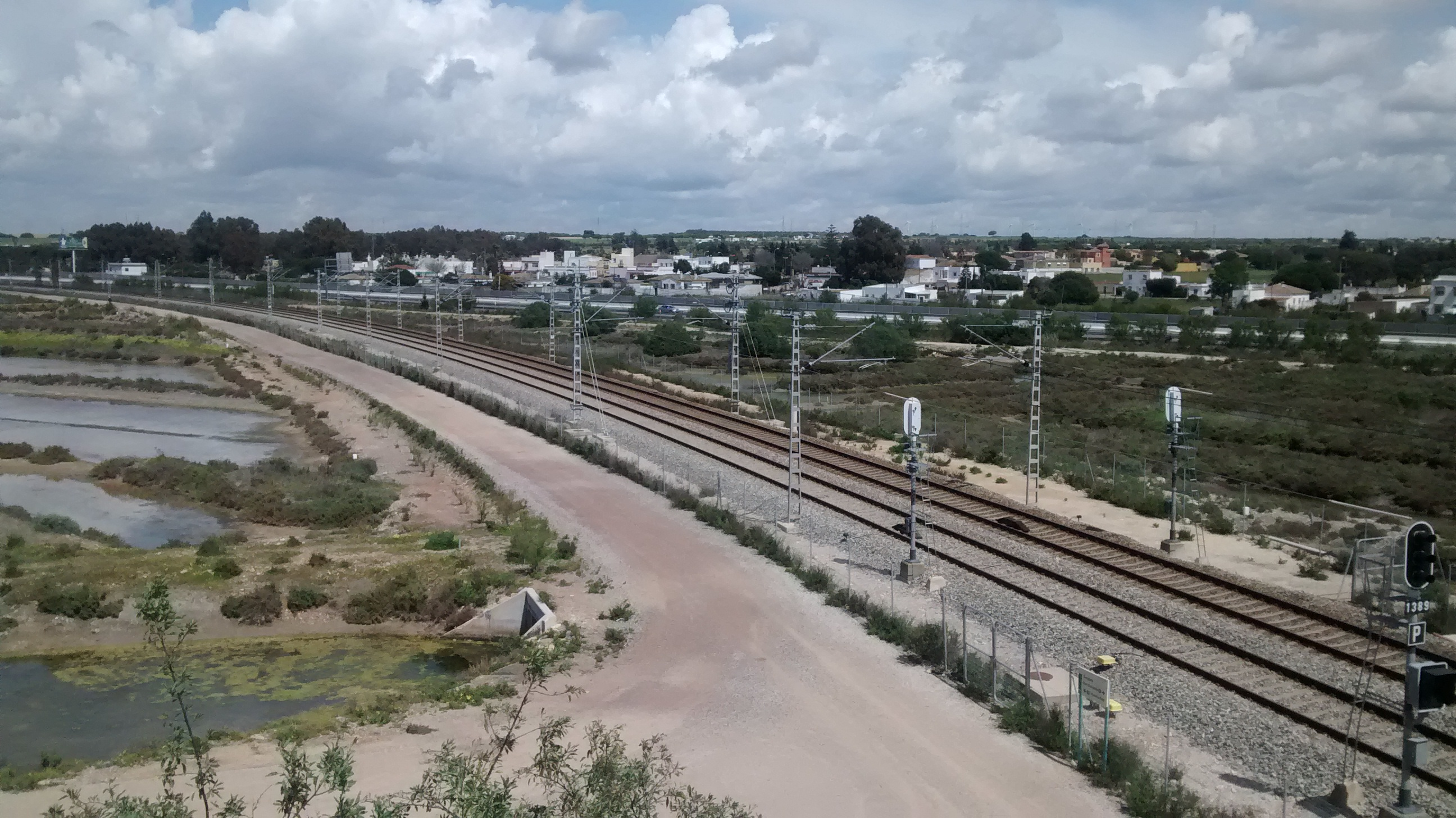 Vista del Barrio Jarana desde la linea de alta velocidad